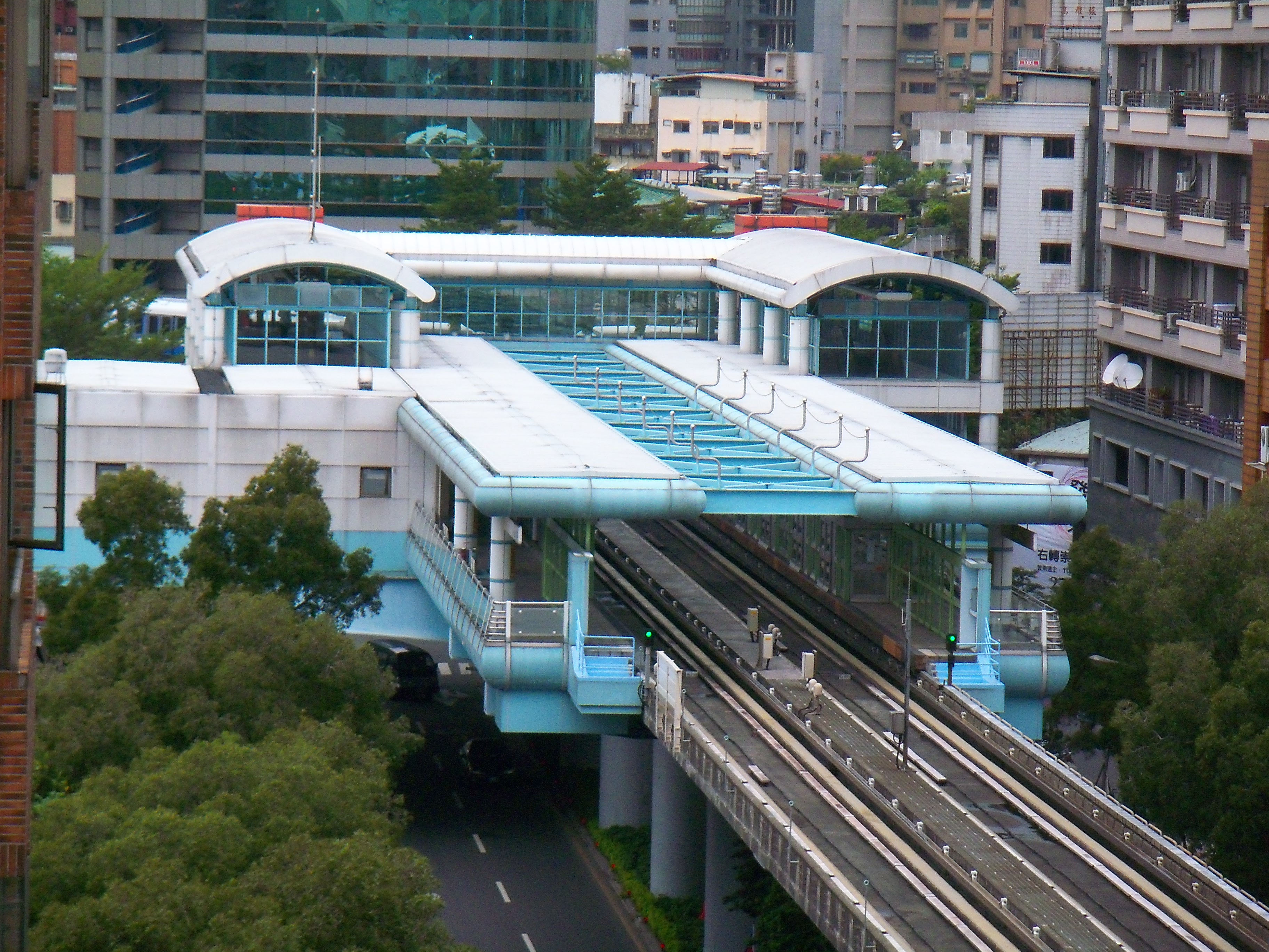 俯瞰臺北捷運文山線六張犁站。